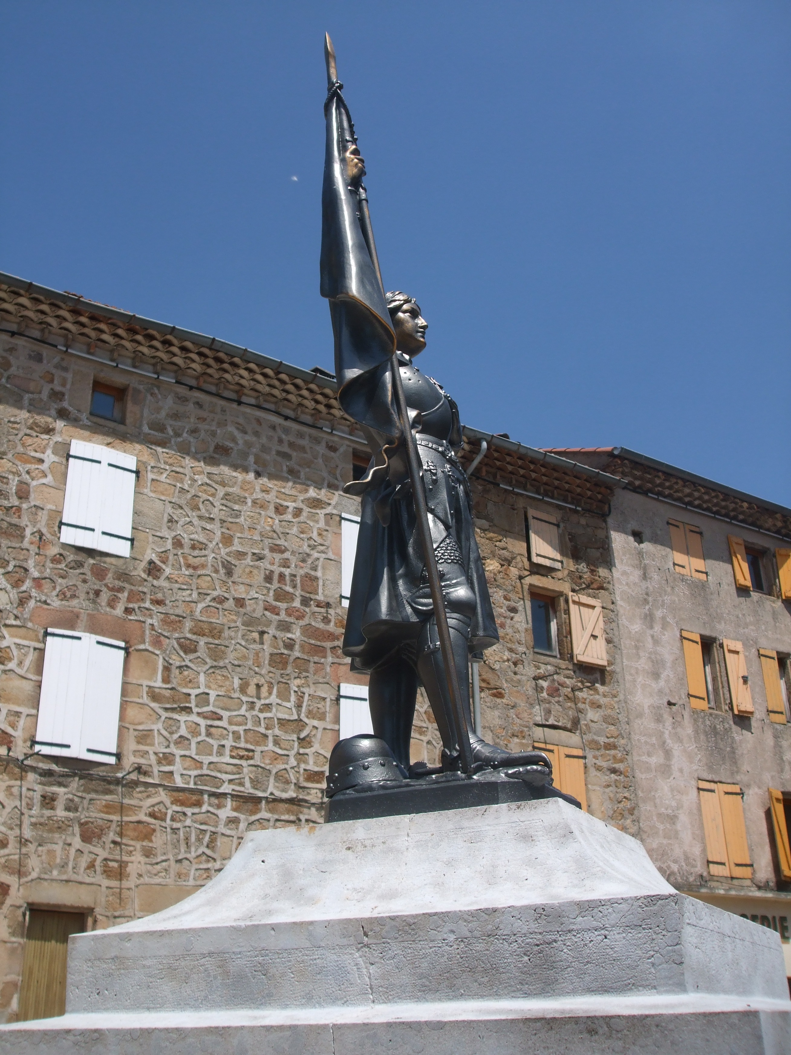 statue de Jeanne d'Arc sur le monument aux morts